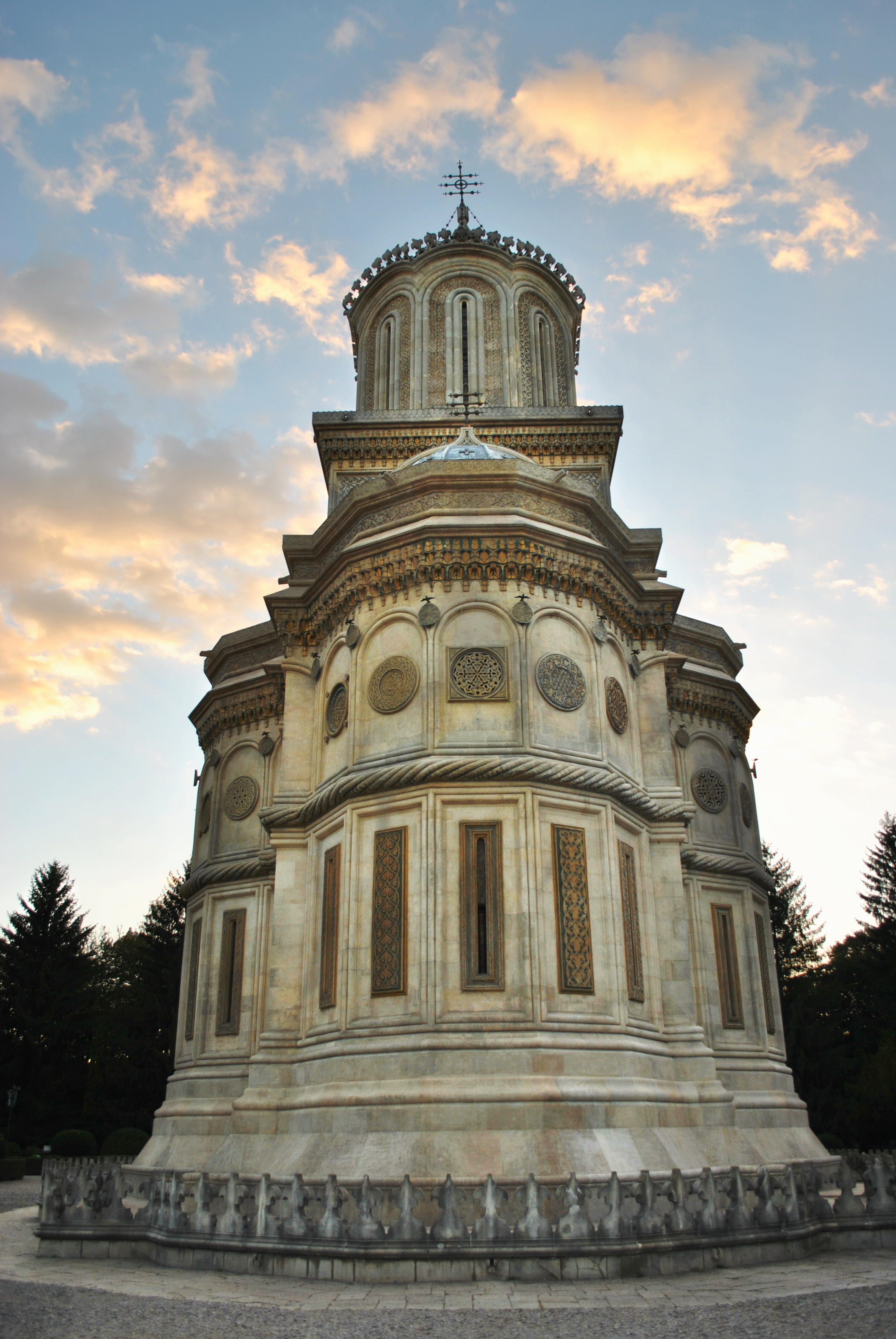 Mănăstirea Argeșului